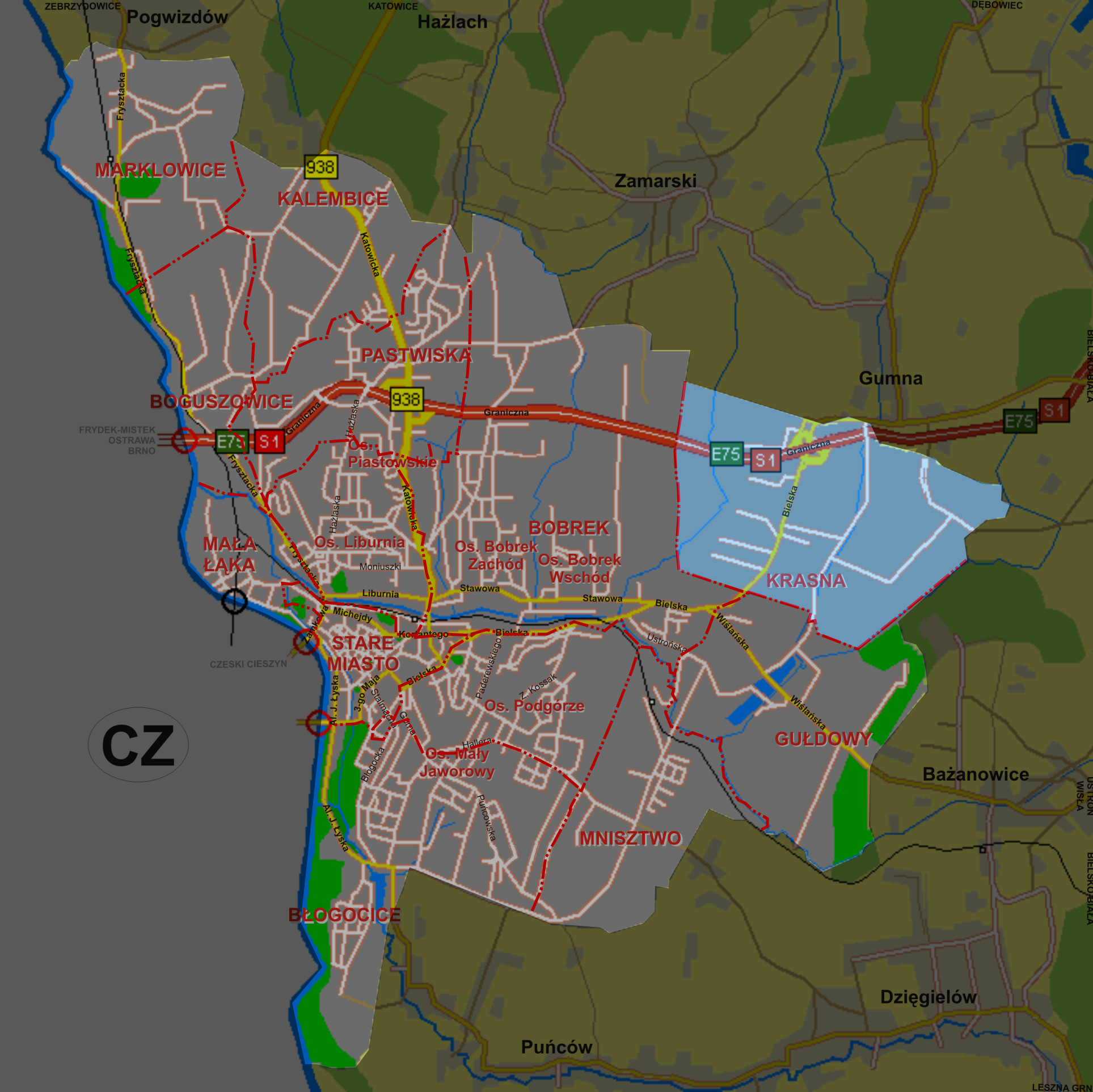 Krasna, dzielnica Cieszyna